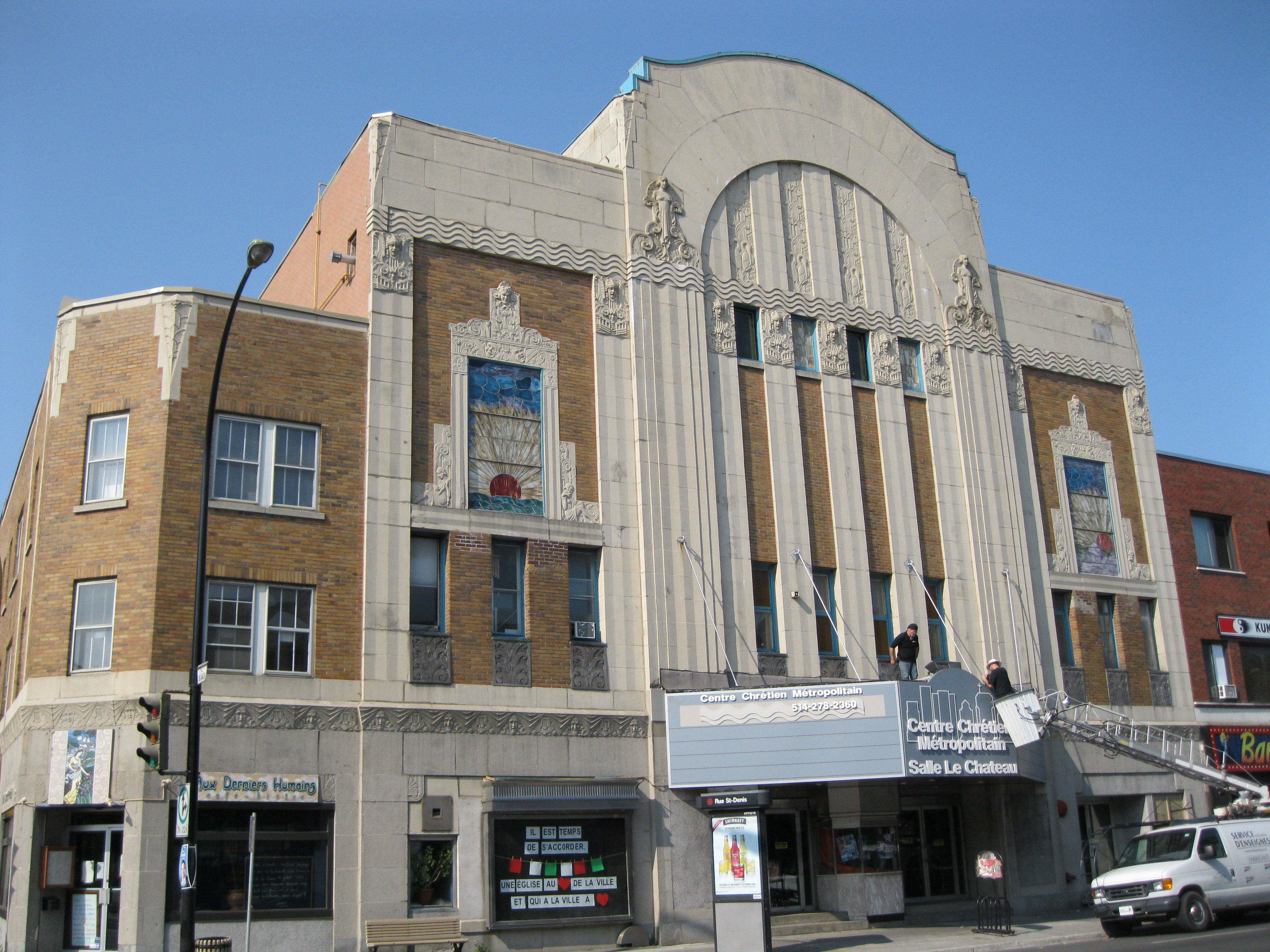 Cinéma Le Château, 6950, rue Saint-Denis, Montréal